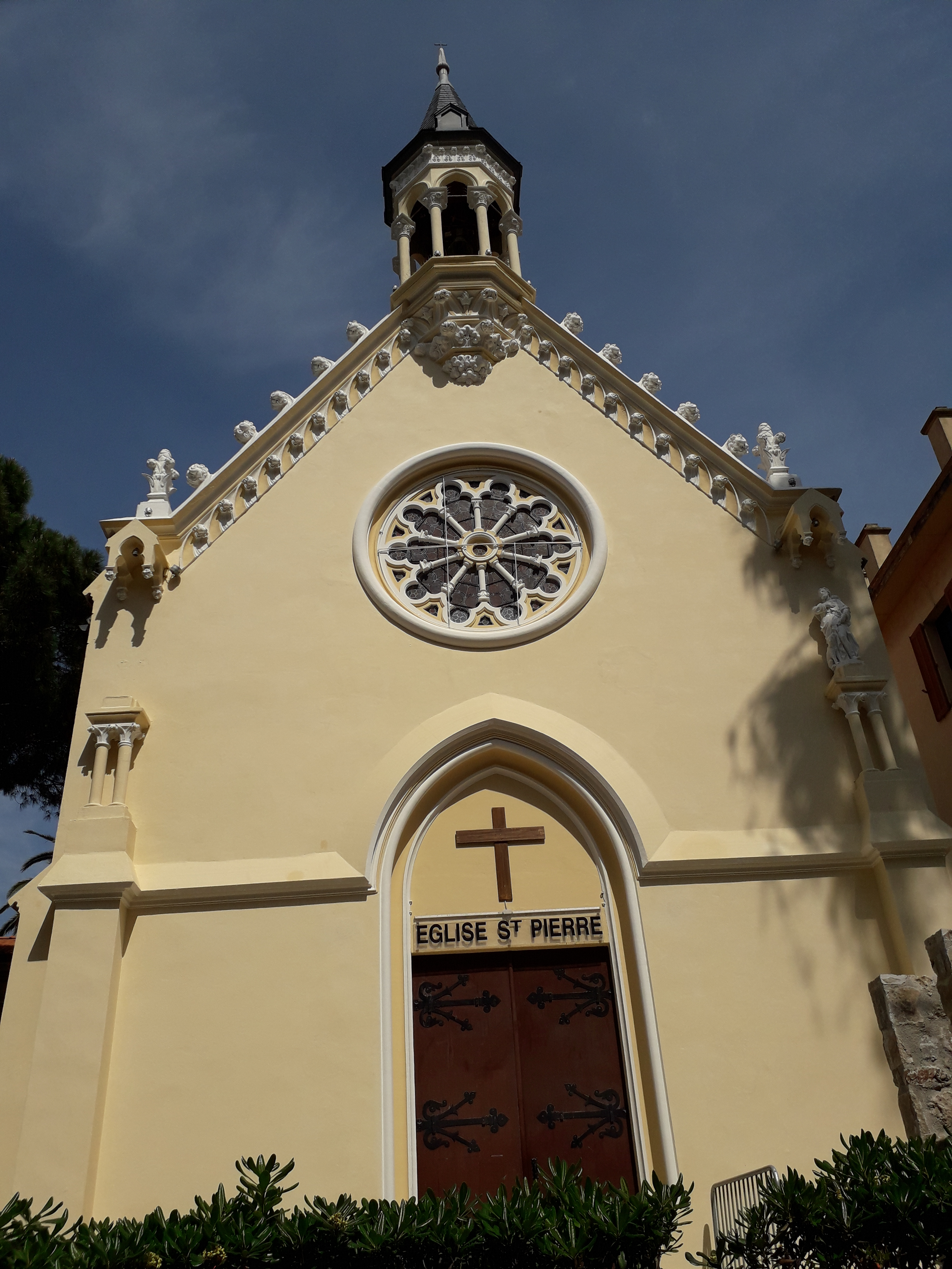 Golfe-Juan Église Saint-Pierre